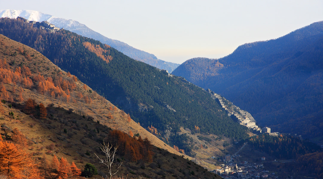 Veduta d'insieme della fortificazione di Fenestrelle